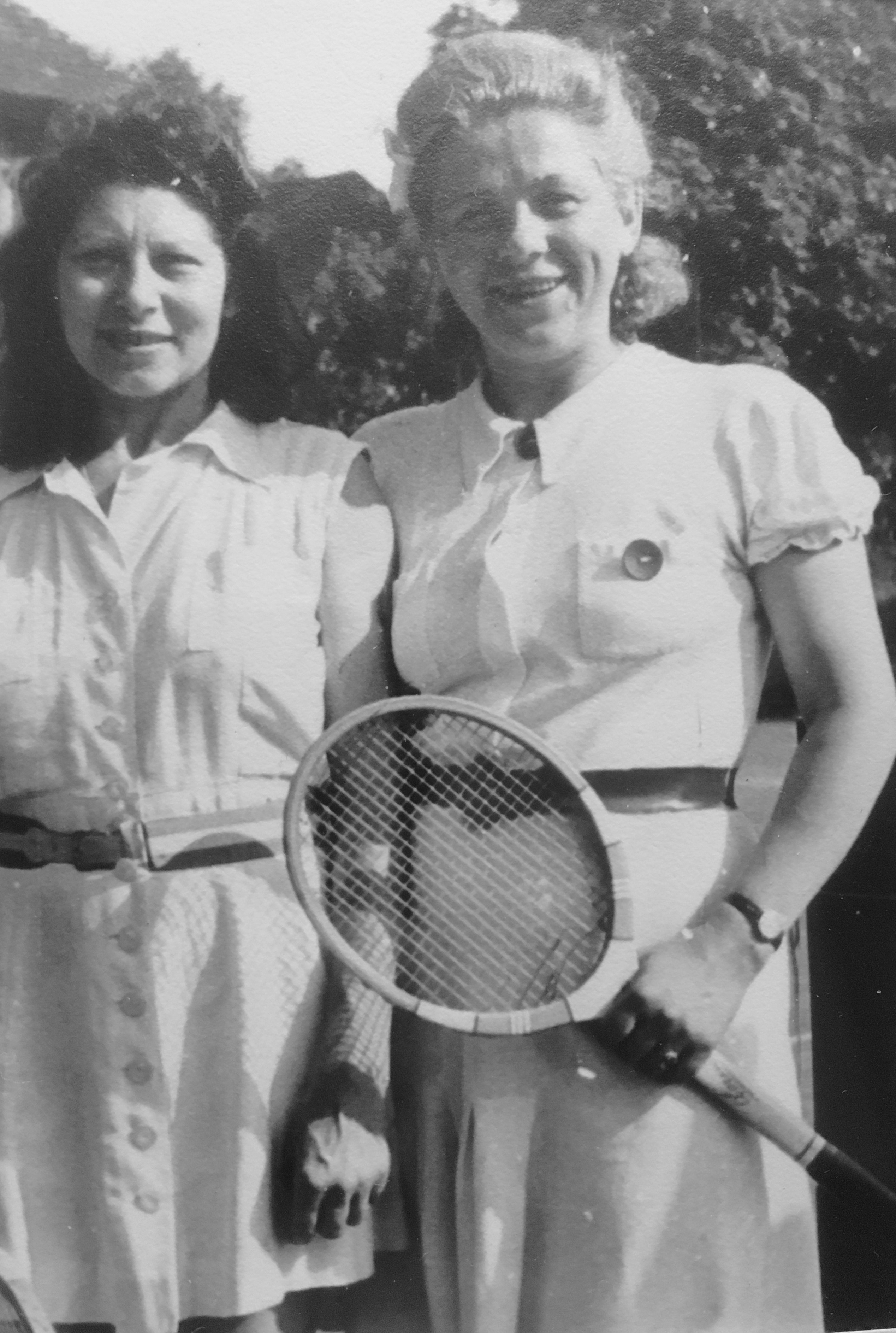 Tennis